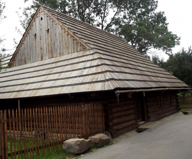 A-394/81 z 02.04.1981